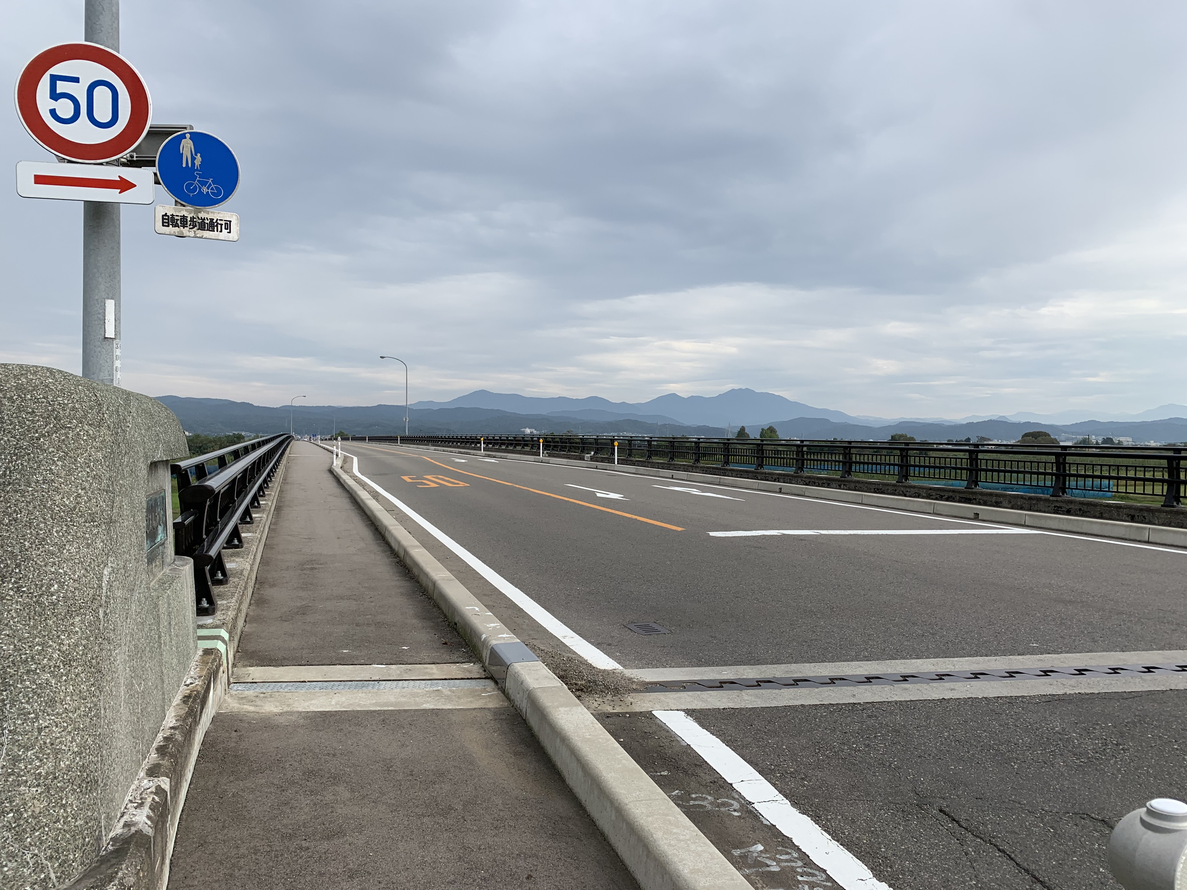 信濃川にかかる五反田橋を左岸から撮影